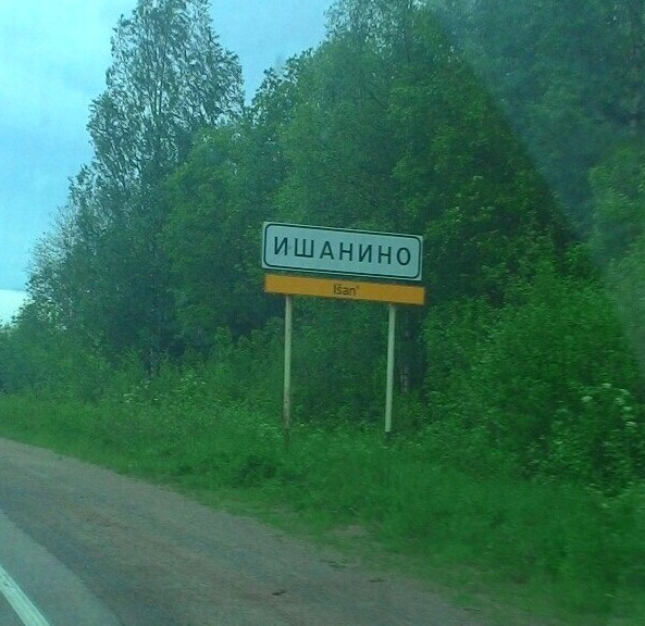 Дорожный знак